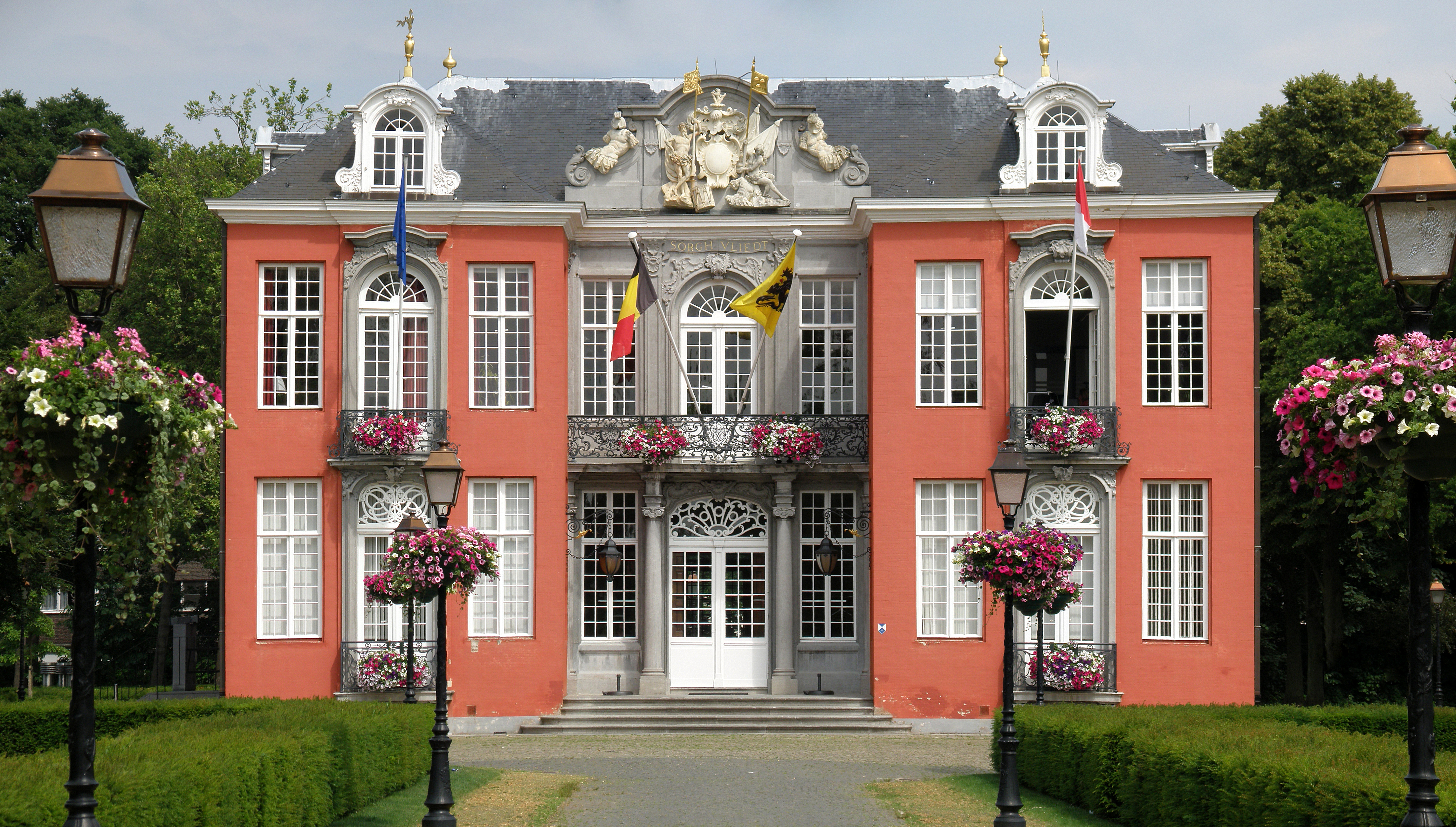 Antwerpen, district Hoboken. Kasteel Sorghvliedt, voorgevel (=westgevel).